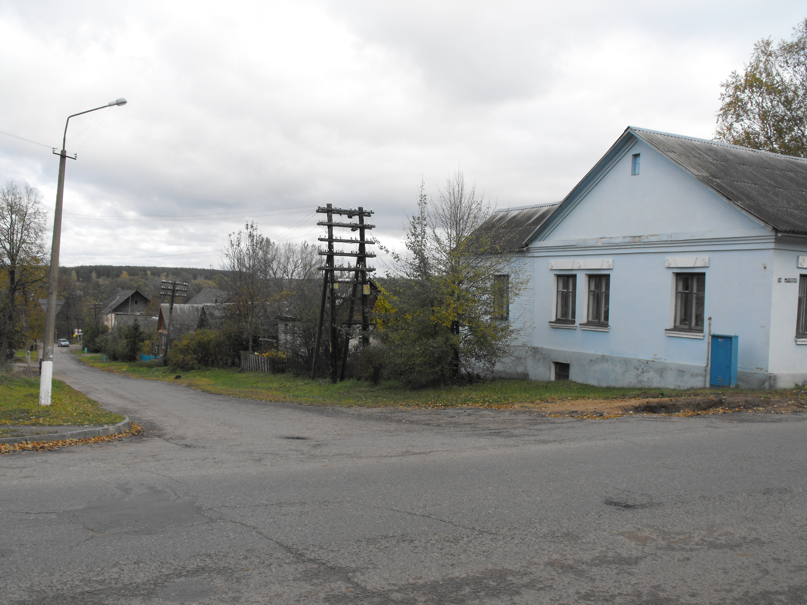 Спуск к реке по улице Советской, по которой евреев Бешенковичского гетто вели на расстрел (вид с места пересечения улиц Советская и Интернациональная).